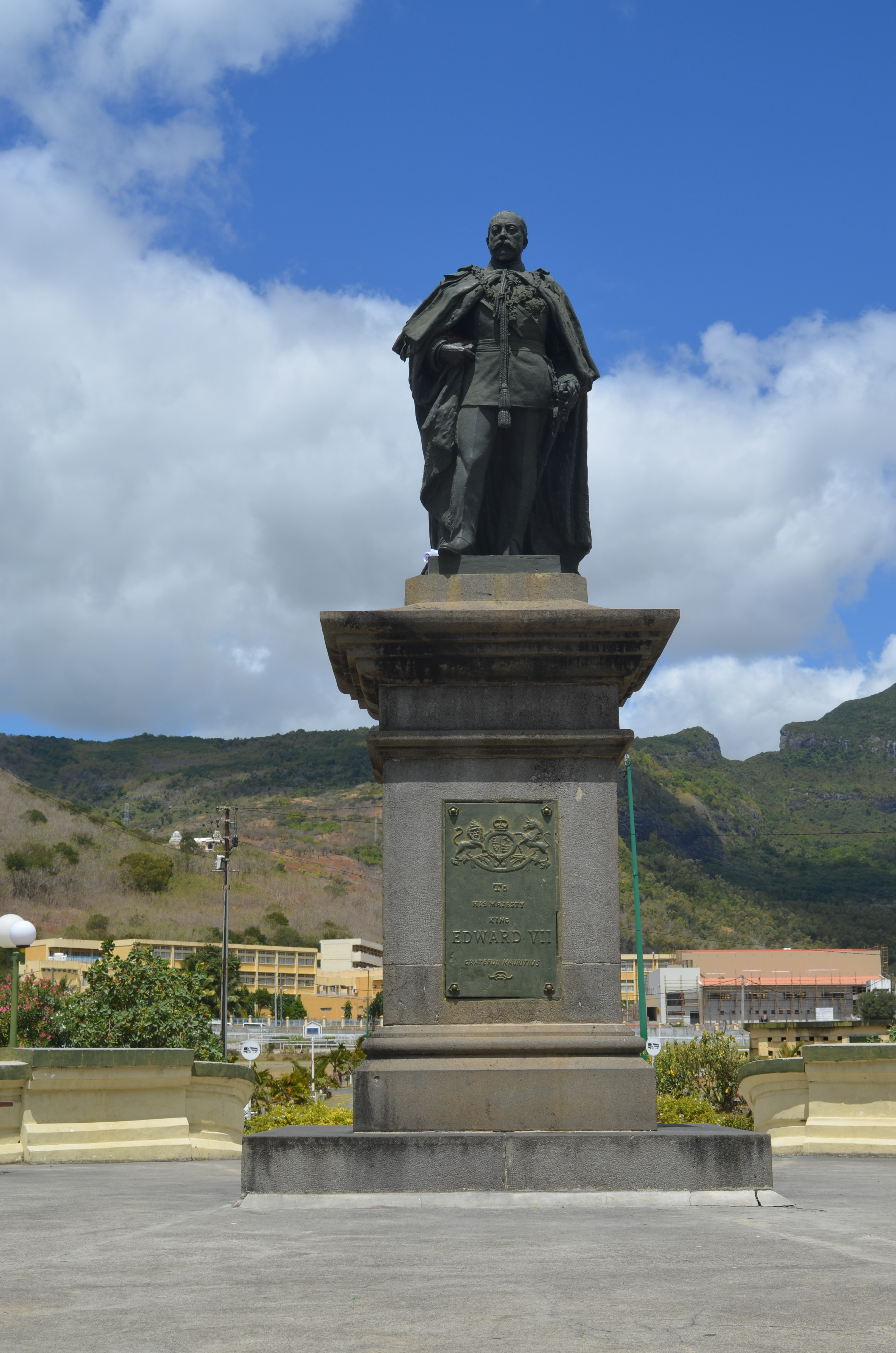 Port Louis, Statue King Edward VII